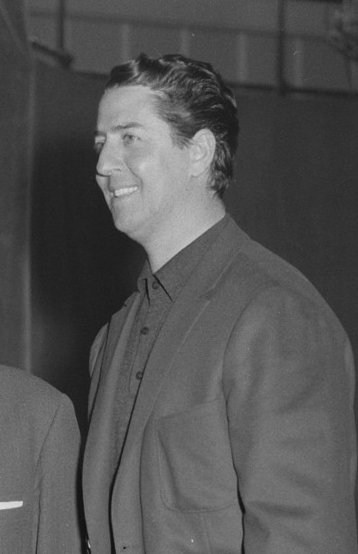 Vico Torriani treedt op voor de KRO